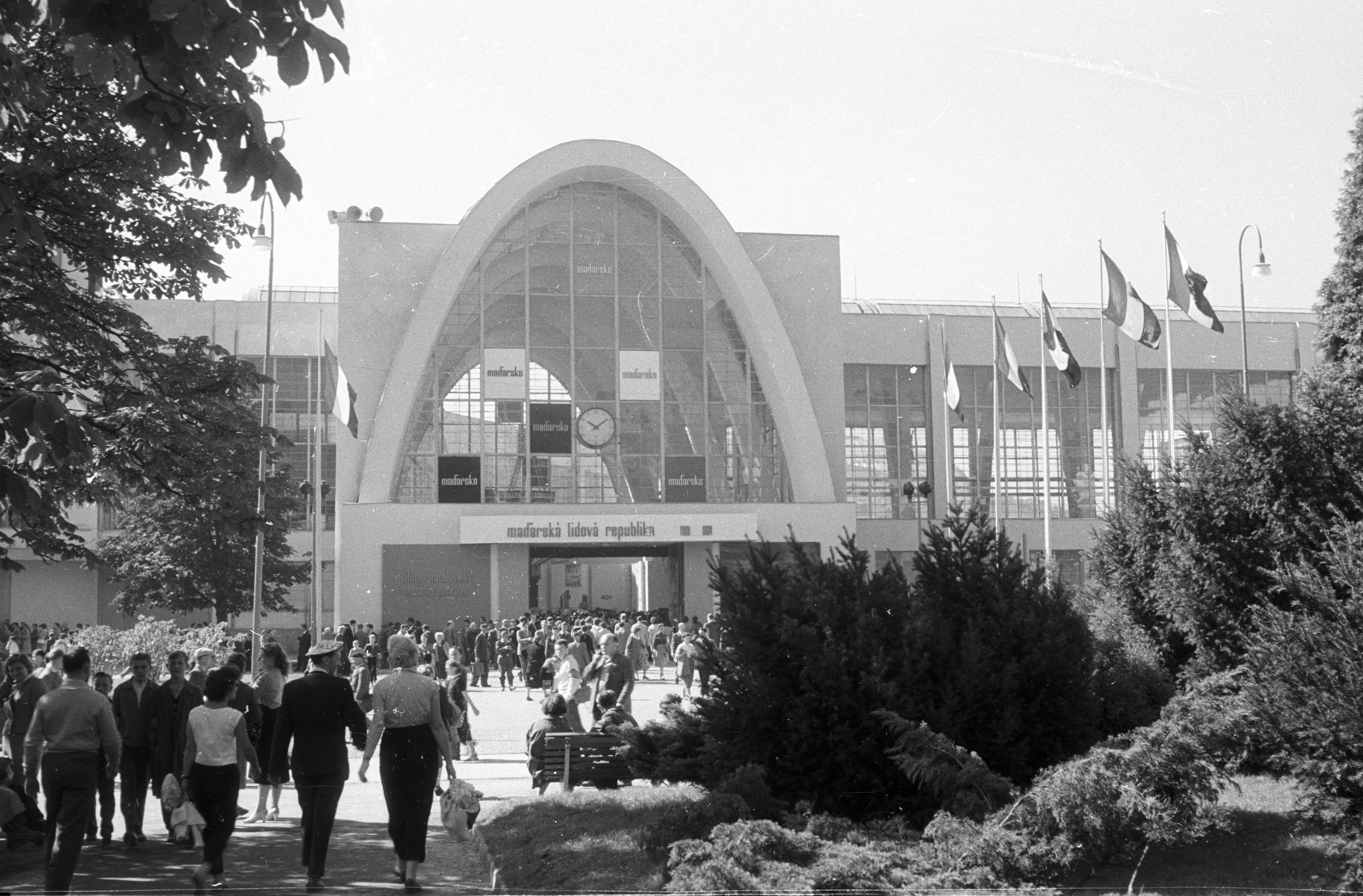 Vásárváros, Brnói Nemzetközi Vásár, kiállítási csarnok. Magyarország kiállítása. Location: Czech Republik, Brno Tags: Czechoslovakia, international fair, watch, flag pole, flag Title: Vásárváros, Brnói Nemzetközi Vásár, kiállítási csarnok. Magyarország kiállítása.